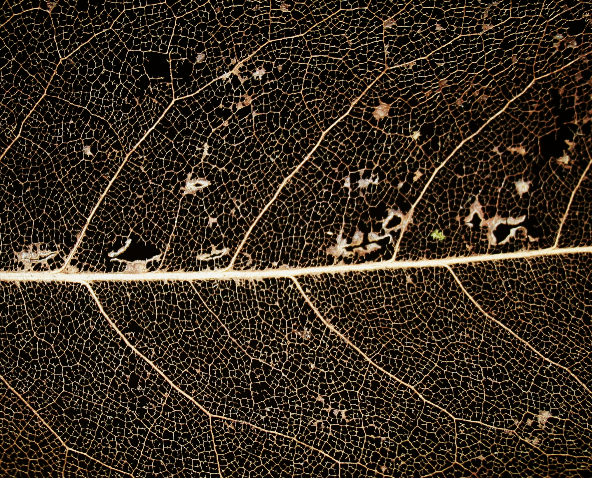 Vein skeleton of a leaf